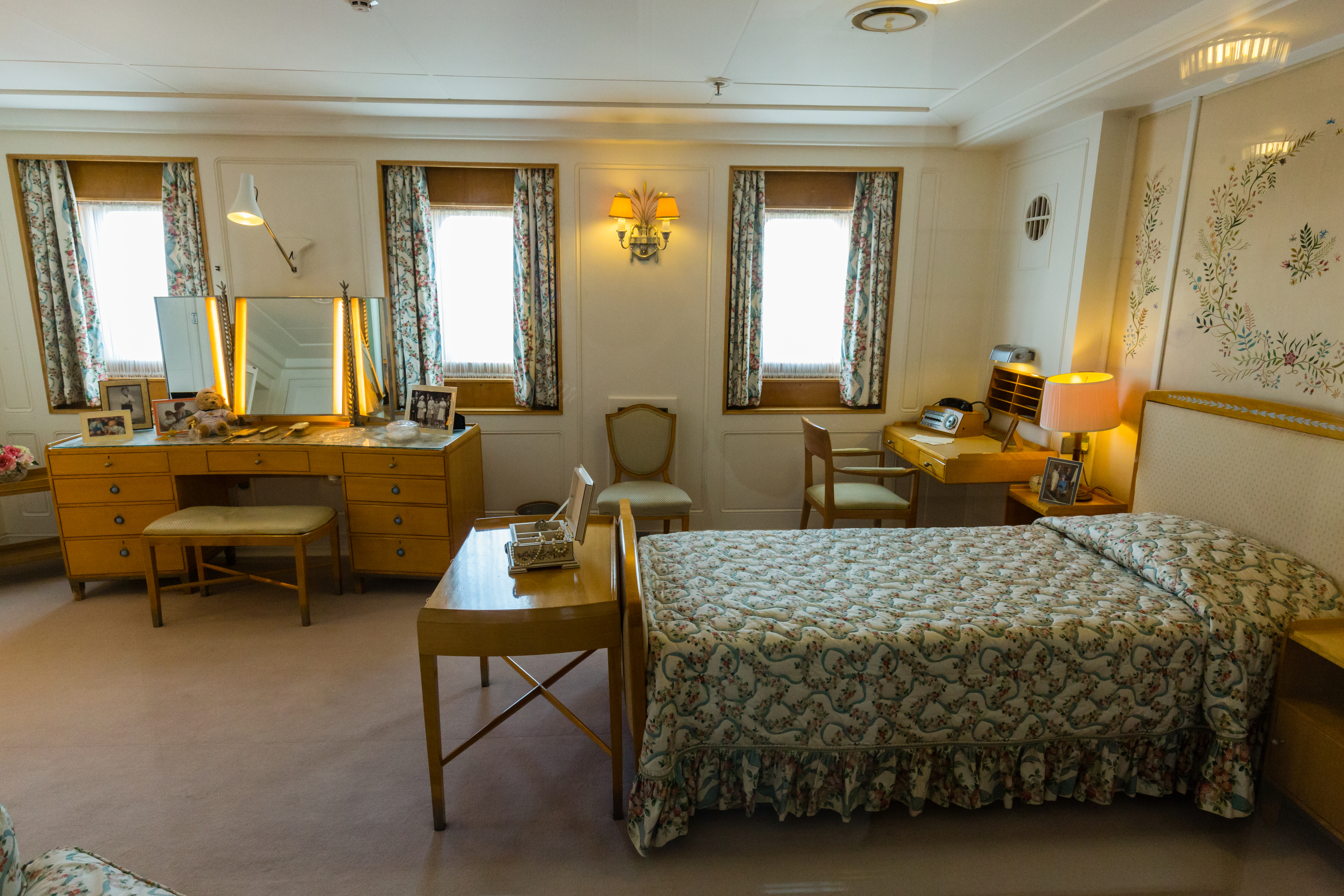 Britannia - Schlafzimmer Queen